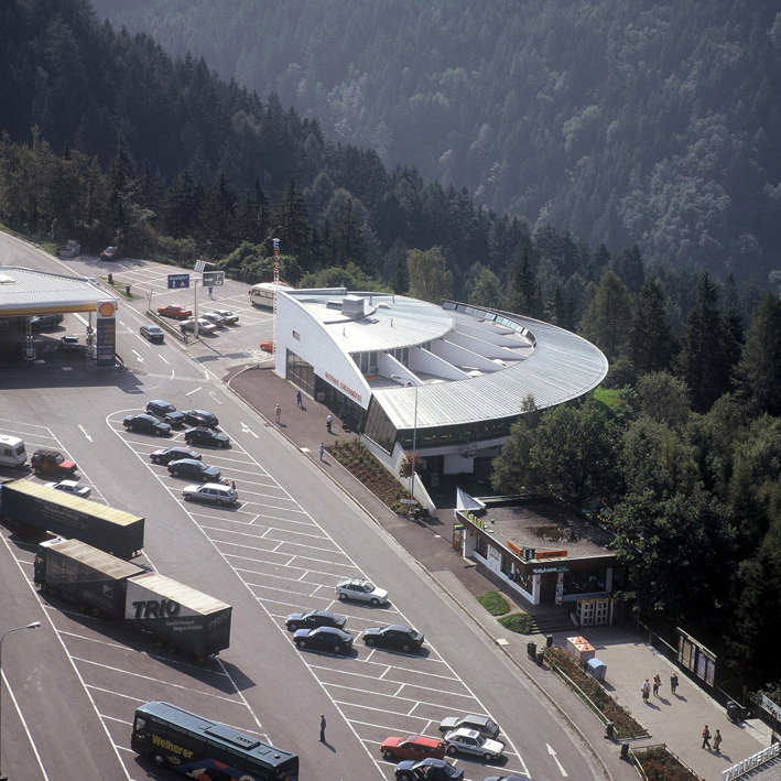 Mehrzweckgebäude mit Rasthaus, Europabrücke (A)